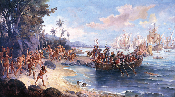 Pedro Álvares Cabral disembarking in Porto Seguro in 1500 by Oscar Pereira da Silva (Museu Paulista)